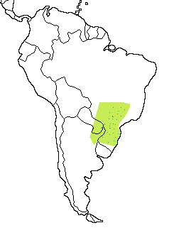 Distribución de los Lágidos